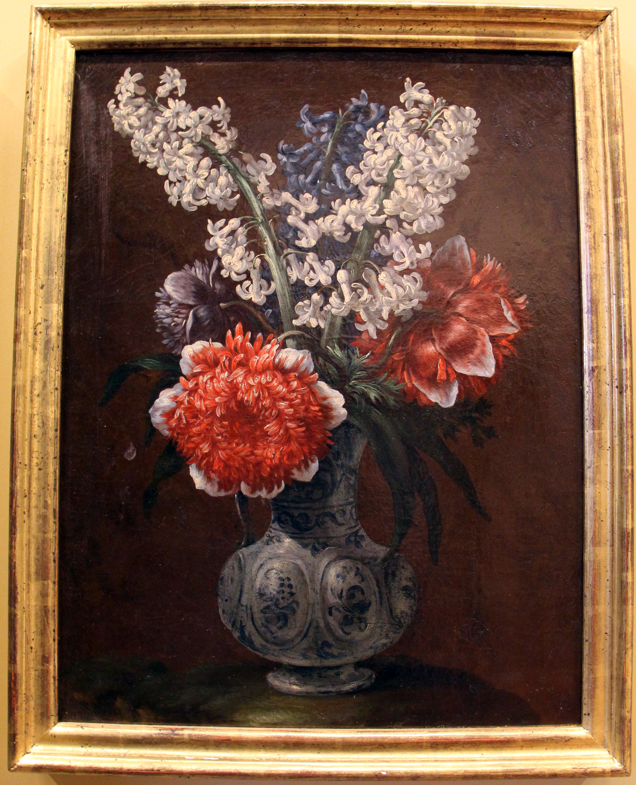 Villa medicea di Poggio a Caiano - MIBAC The making of this document was supported by Wikimedia CH. (Submit your project!) For all the files concerned, please see the category Supported by Wikimedia CH. This is a photo of a monument which is part of cultural heritage of Italy.